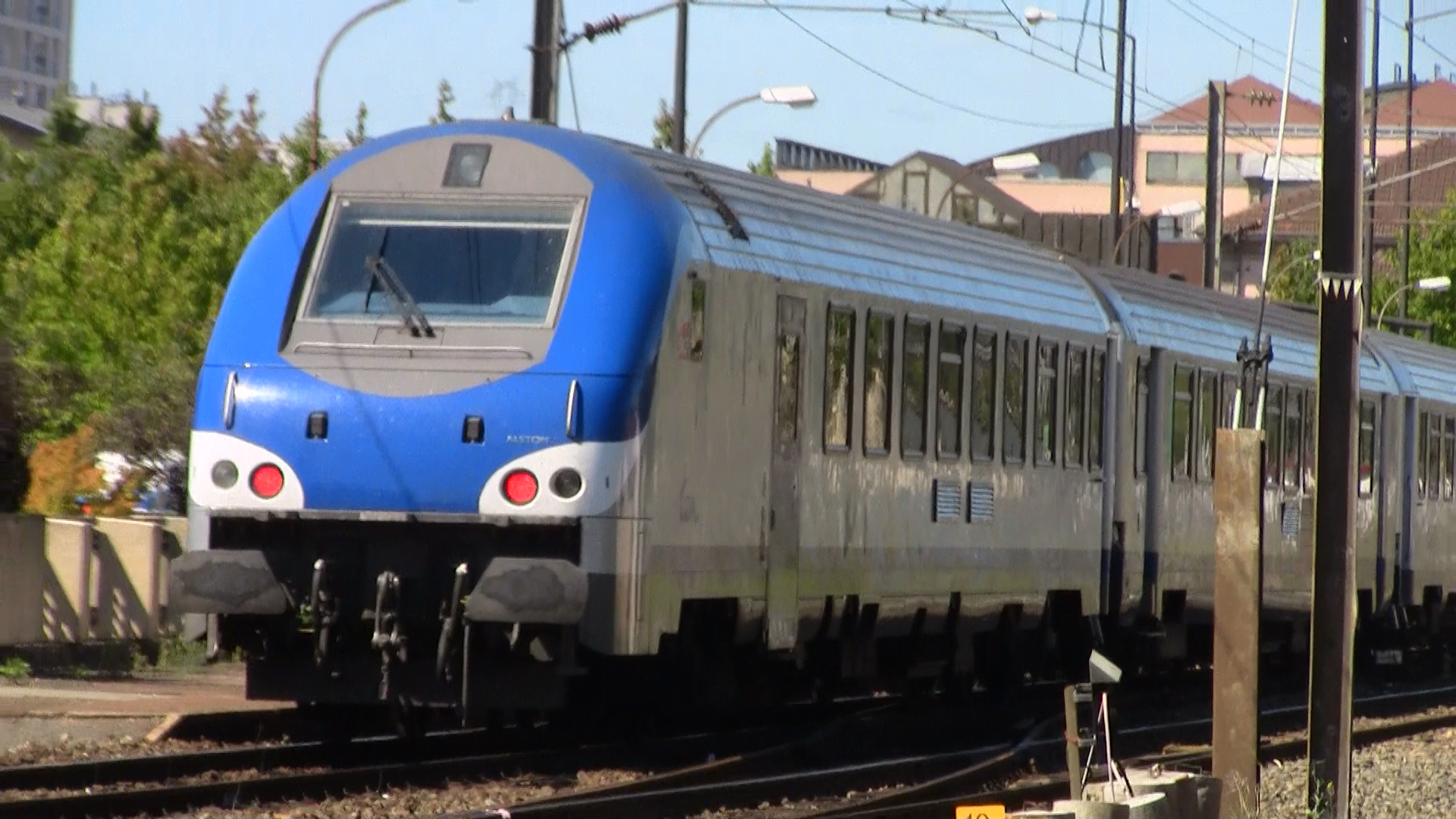 voiture pilote B5uxh à Montbéliard (25)